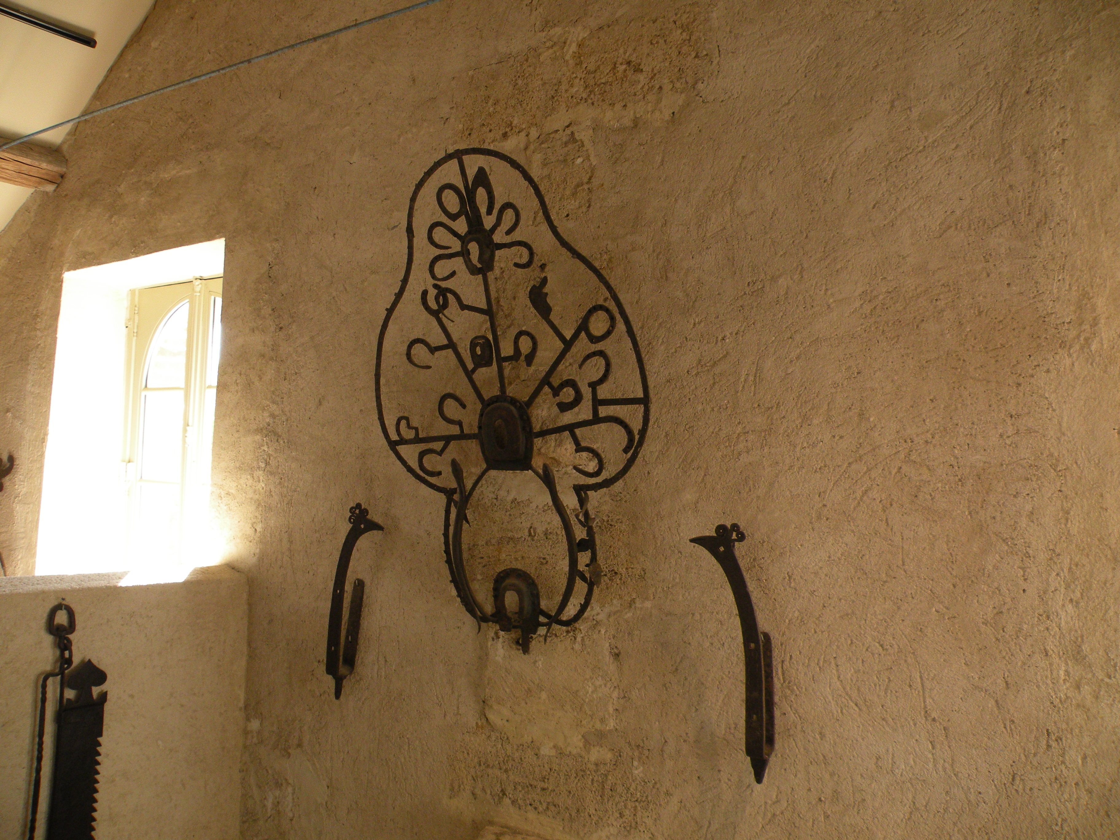 Collection du Musée du Vexin français